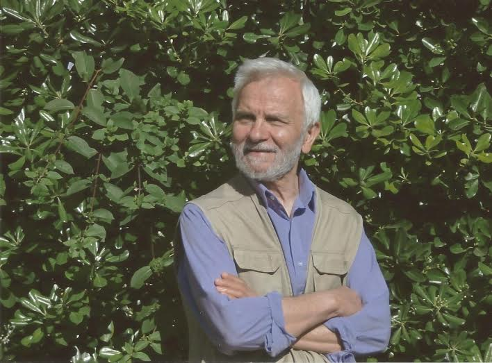 Storico, scrittore e giornalista italiano